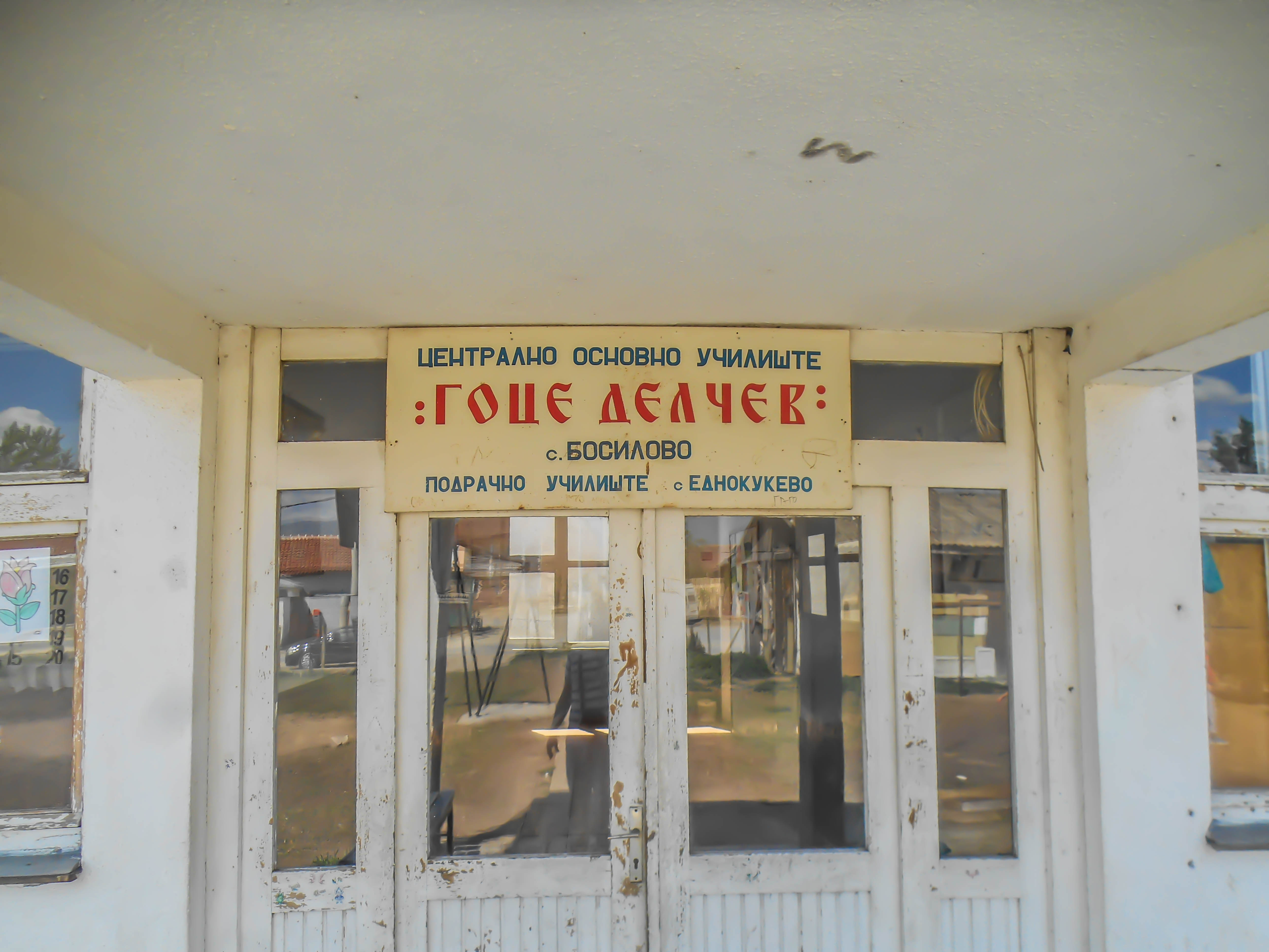 Основно училиште „Гоце Делчев“ - Еднокуќево